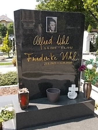 Alfred Uhl-Grinzinger Friedhof (8-2-8)